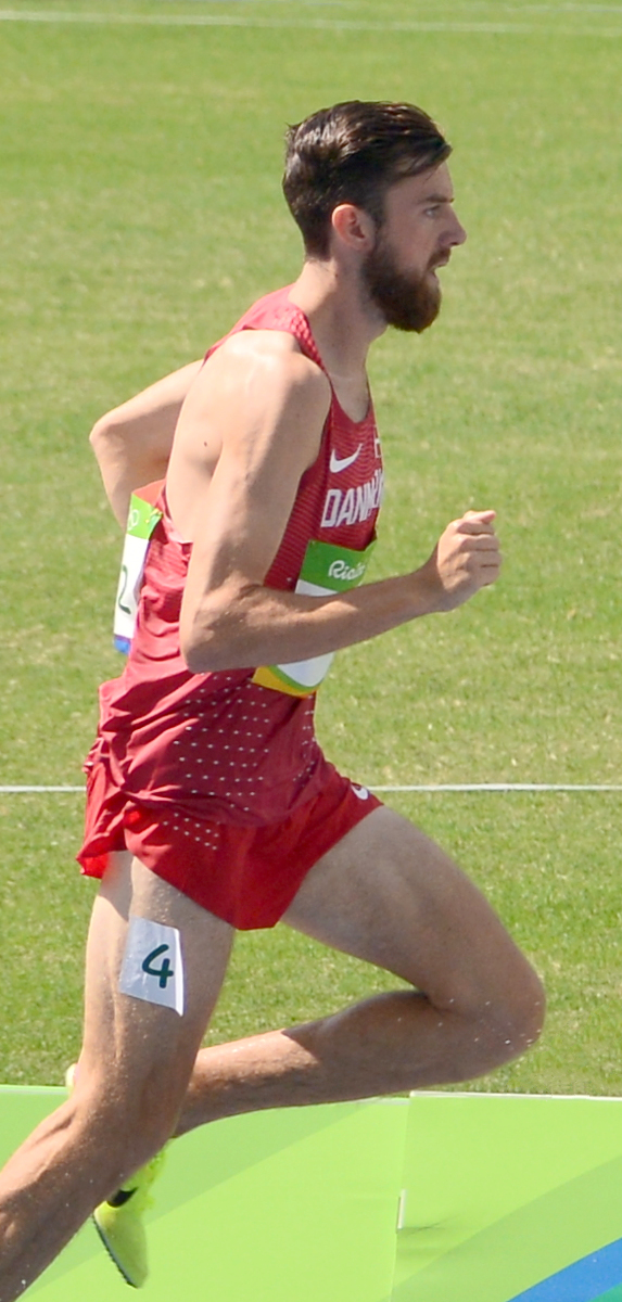 Série du 3000m steeple Homme des JO de Rio, 2016